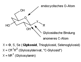 Grundstruktur eines Glykosids und verwandter Verbindungen mit R ≠ H, (C=O)-R'